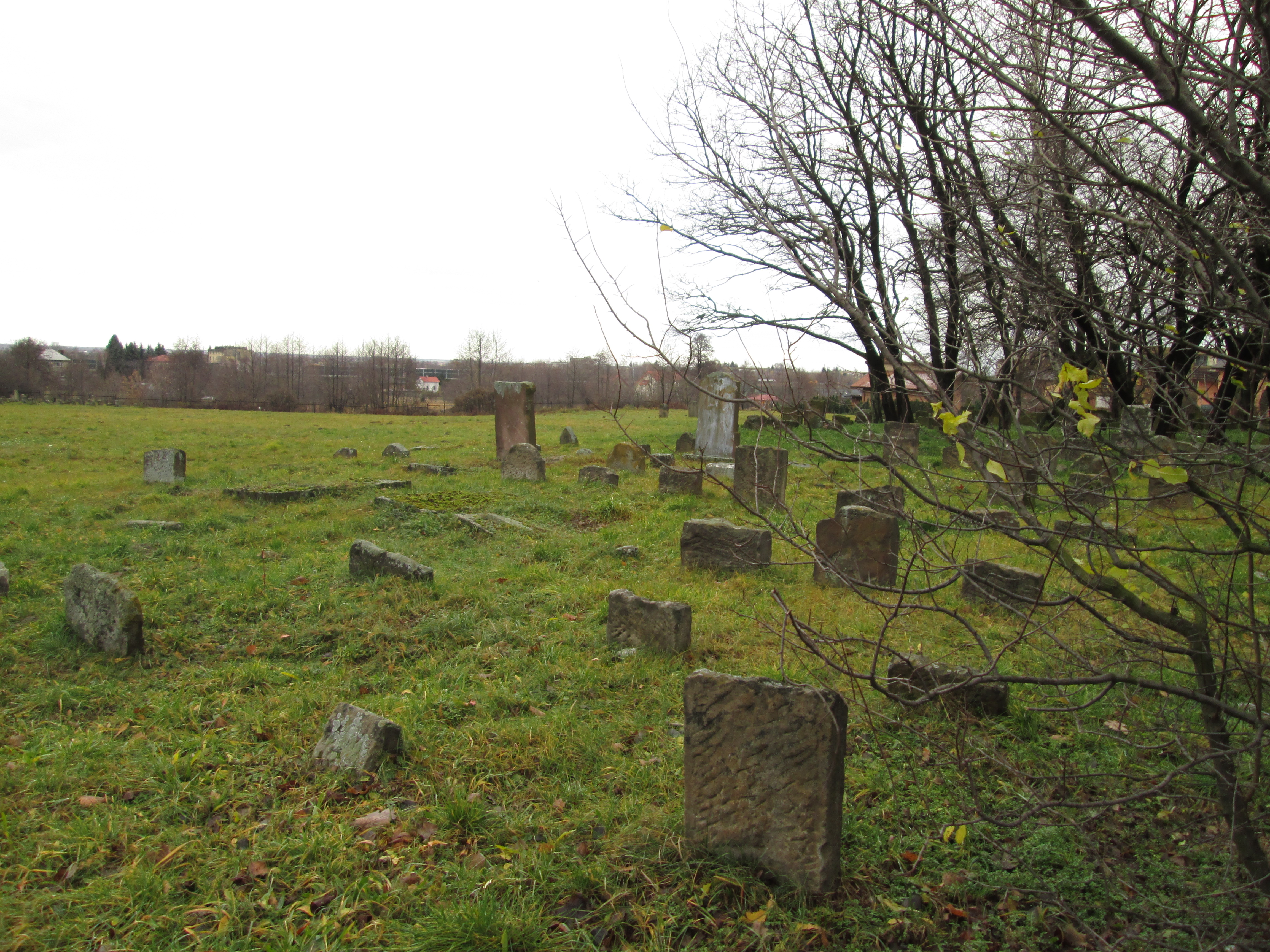 Ruiny cmentarza żydowskiego